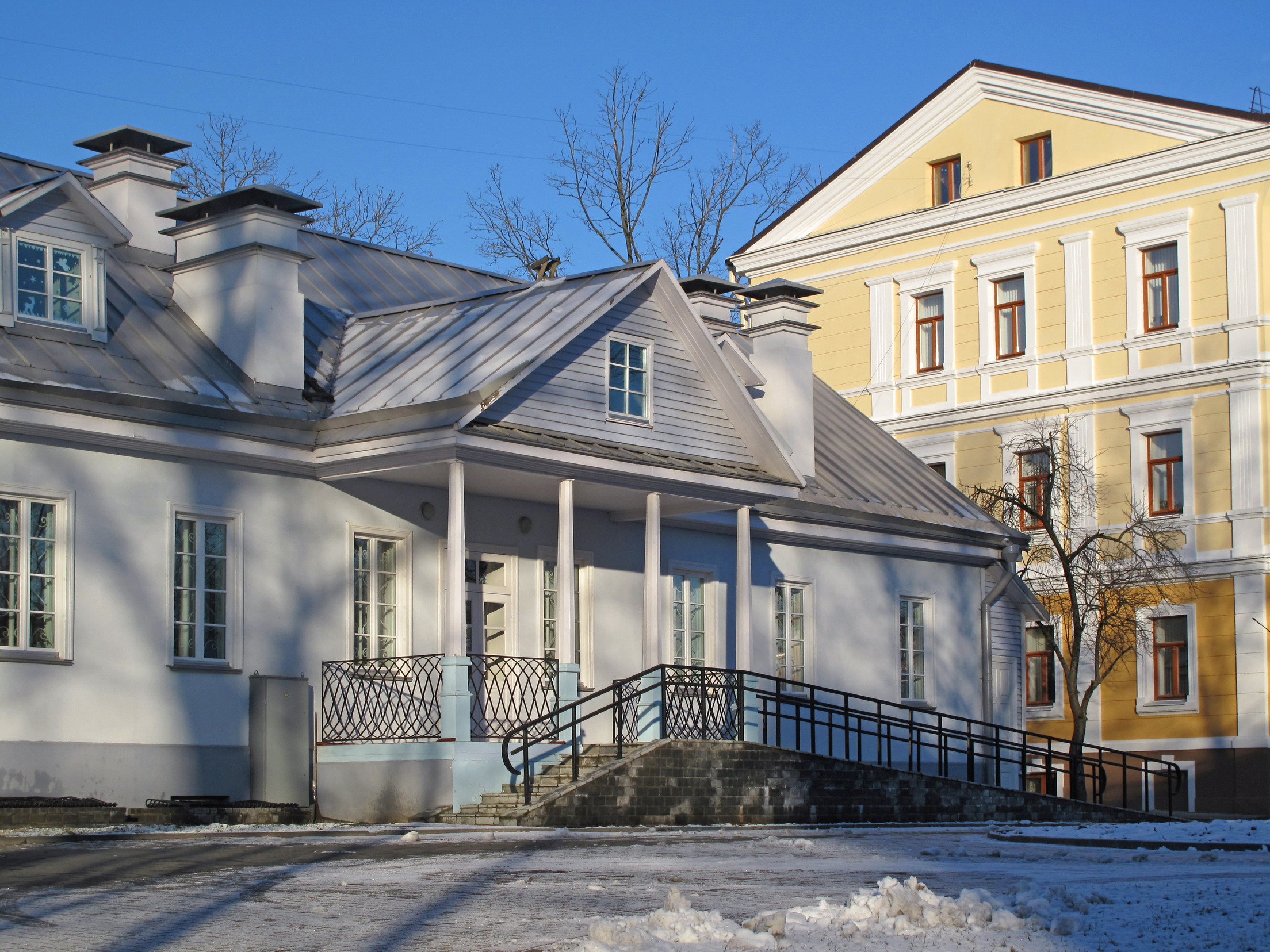 Беларуская (тарашкевіца): Дом Э Ожешко вид со двора